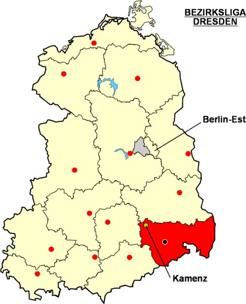 Localisation de Kamenz dans la "Bezirksliga Dresden" Catégorie:Logo de clubs de football - Allemagne